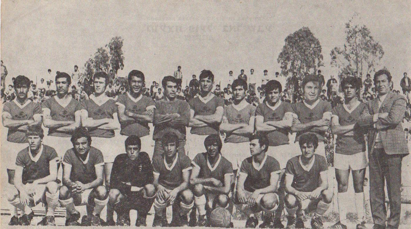 קבוצת הפועל באר שבע